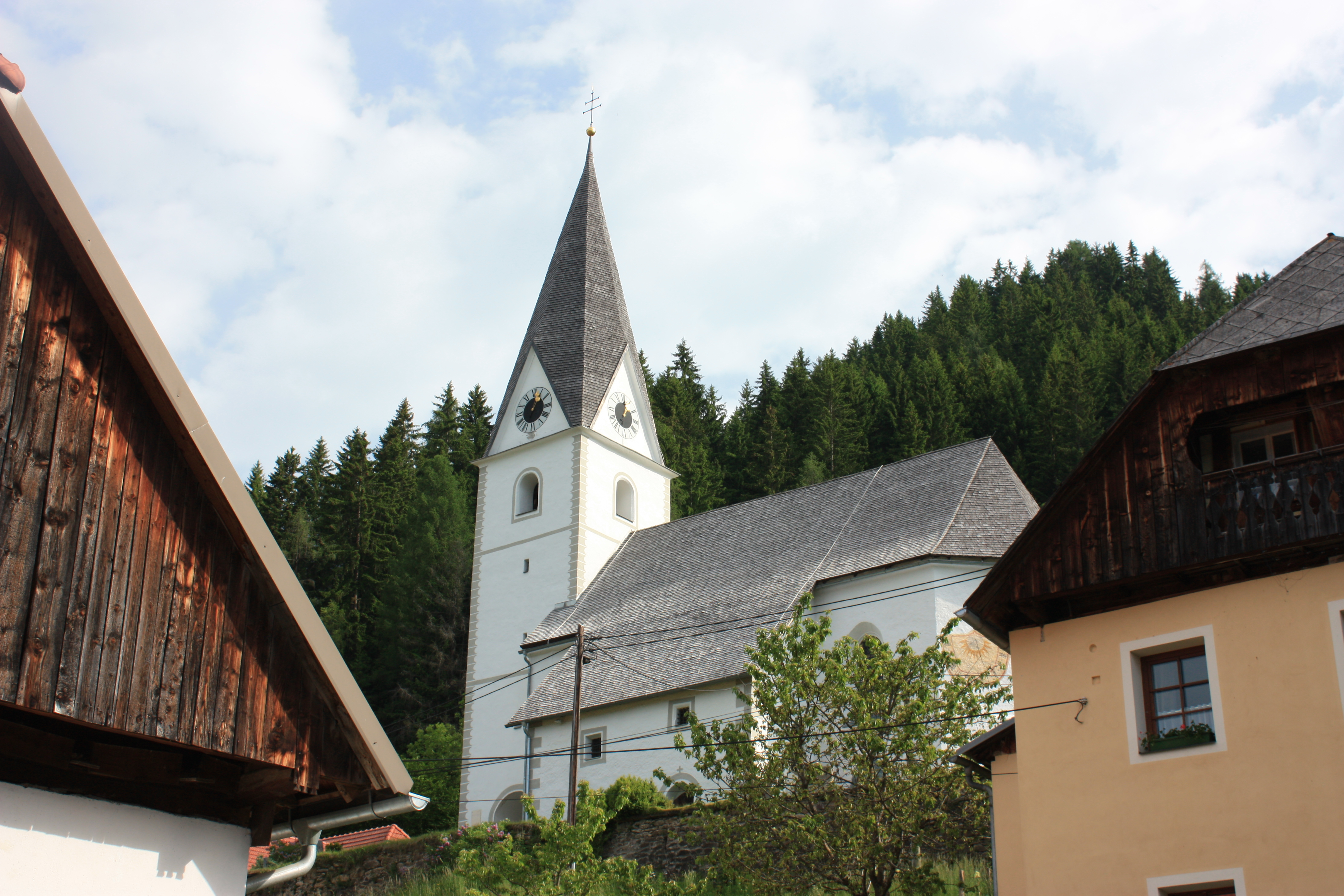 Kath. Pfarrkirche hl. Margaretha mit ummauertem Friedhof, Noreia